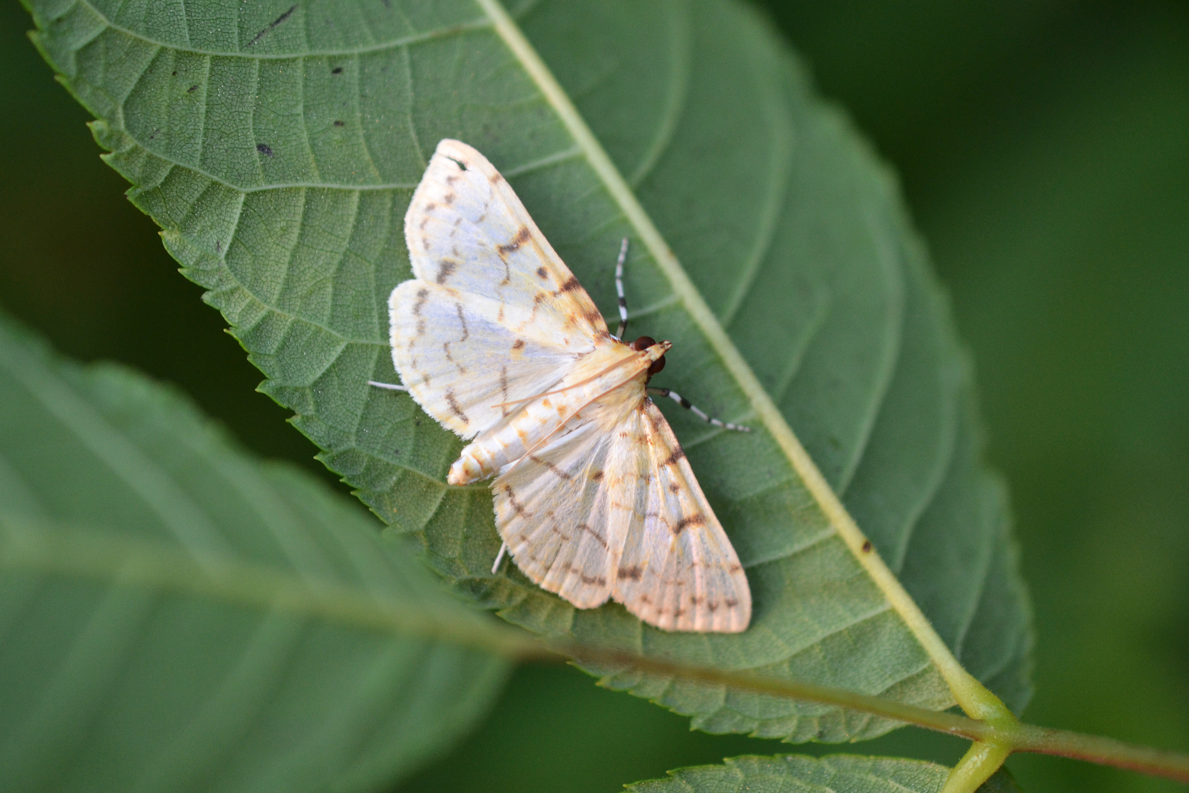 Rentschler Forest Metropark, Fairfield, Ohio